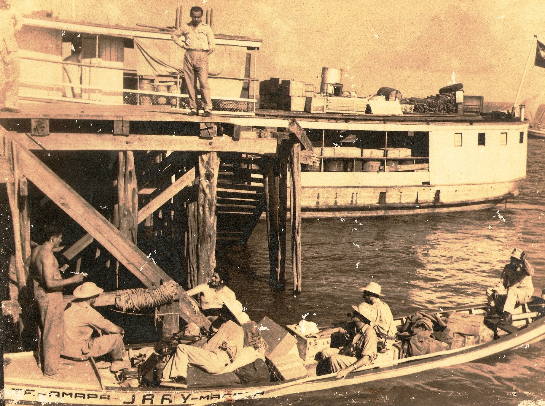 DANILO DU SILVAN -MACAPÁ - AMAPÁ (NO ALTO, SOBRE O TRAPICHE) -DÉCADA DE 1950